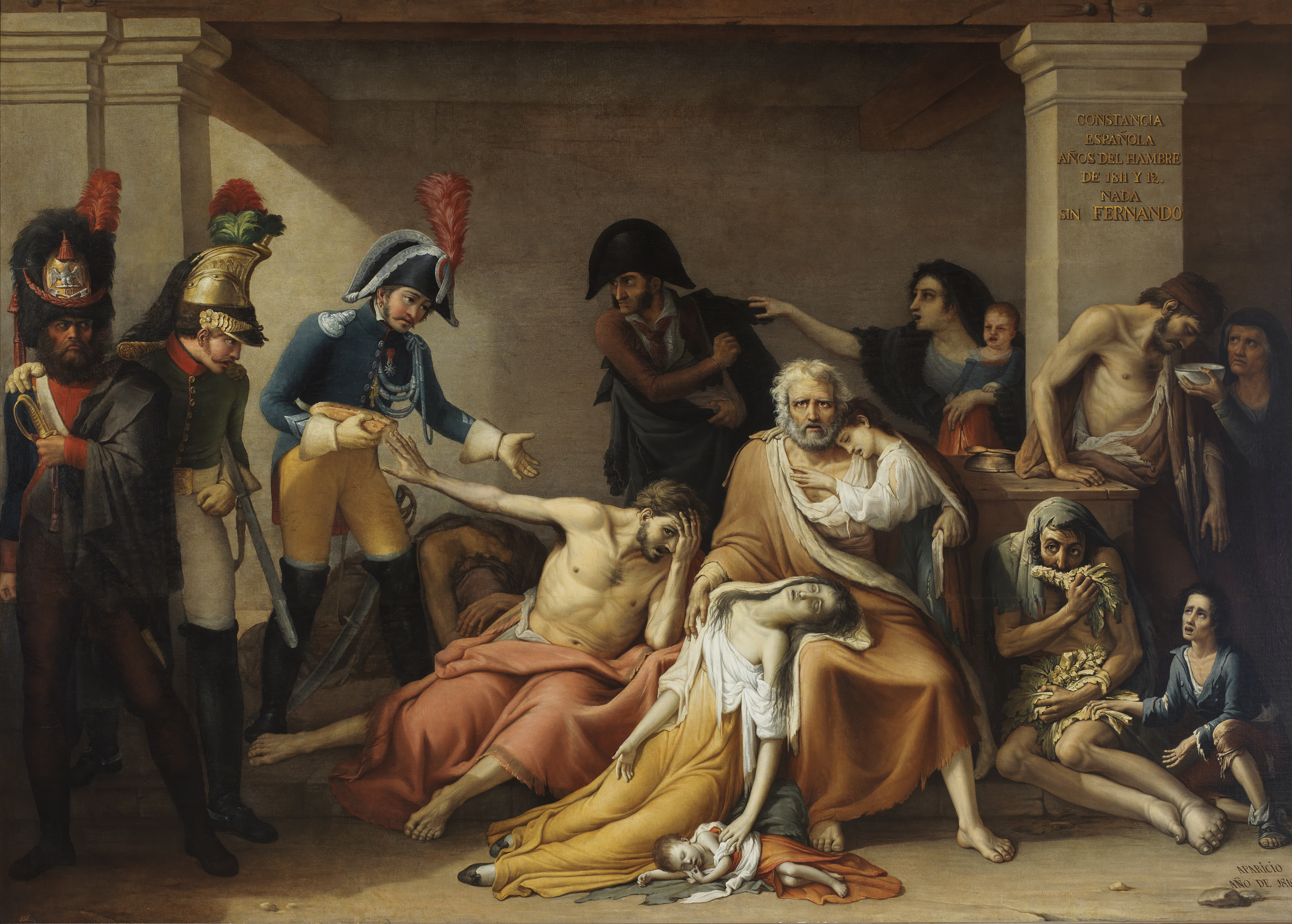 La obra representa el hambre que soportaron los madrileños durante la Guerra de la Independencia Española en los años 1811 y 1812, y los habitantes de dicha ciudad aparecen rechazando orgullosamente la ayuda de los soldados franceses, aunque la obra también constituye un intento de adulación al rey Fernando VII de España.